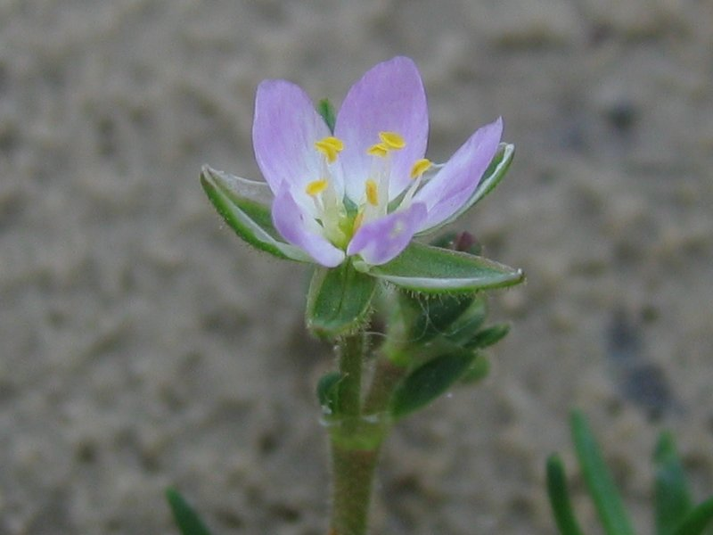 Flügelsamige Schuppenmiere Spergularia media, Wismarbucht